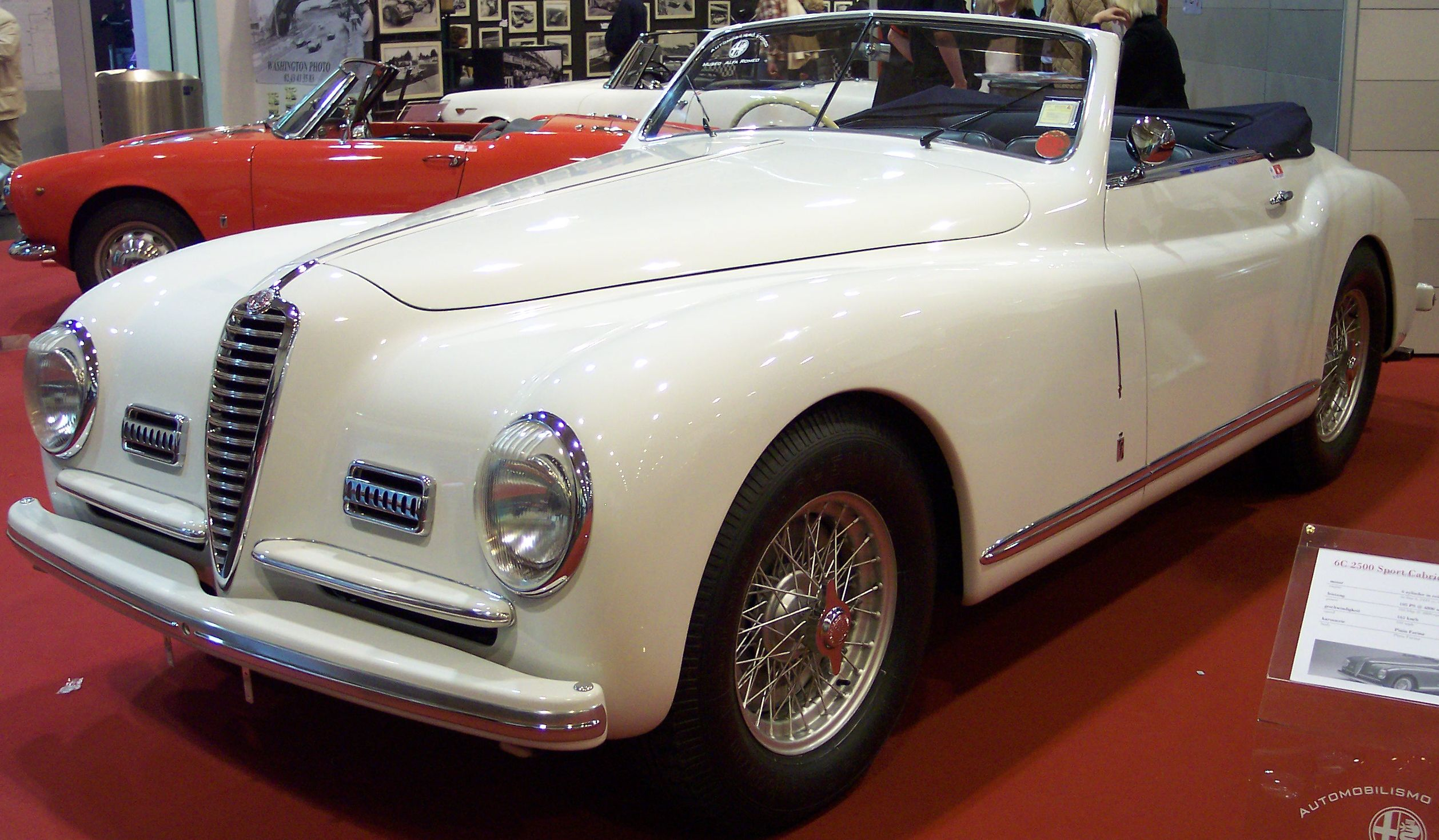 Alfa Romeo 6C 2300 Sport Cabriolet 1947